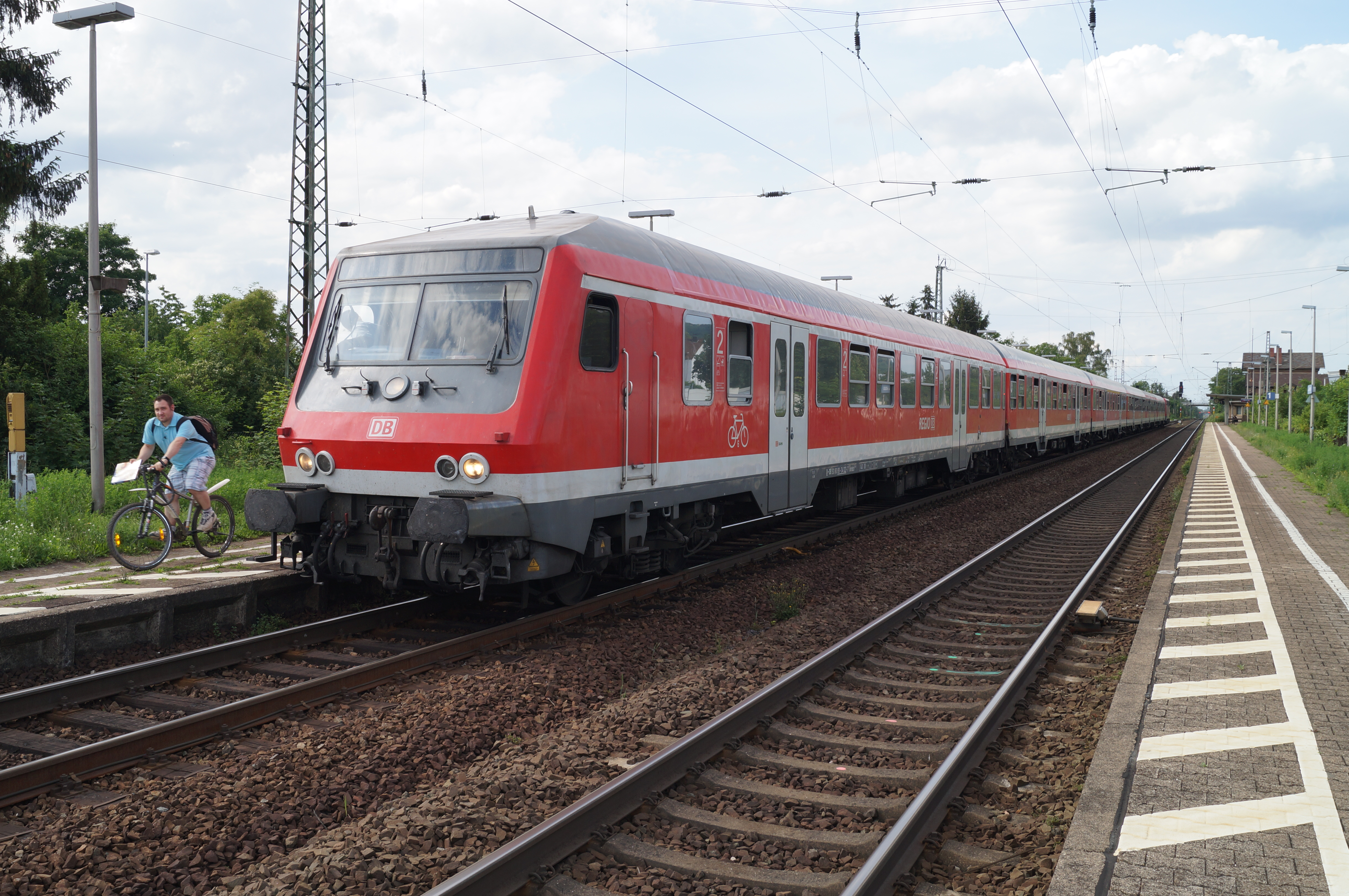 Regionalbahn auf der Main-Neckar-Eisenbahn von Frankfurt am Main Hauptbahnhof im Bensheim-Auerbacher Bahnhof auf dem Weg nach Heidelberg Hauptbahnhof